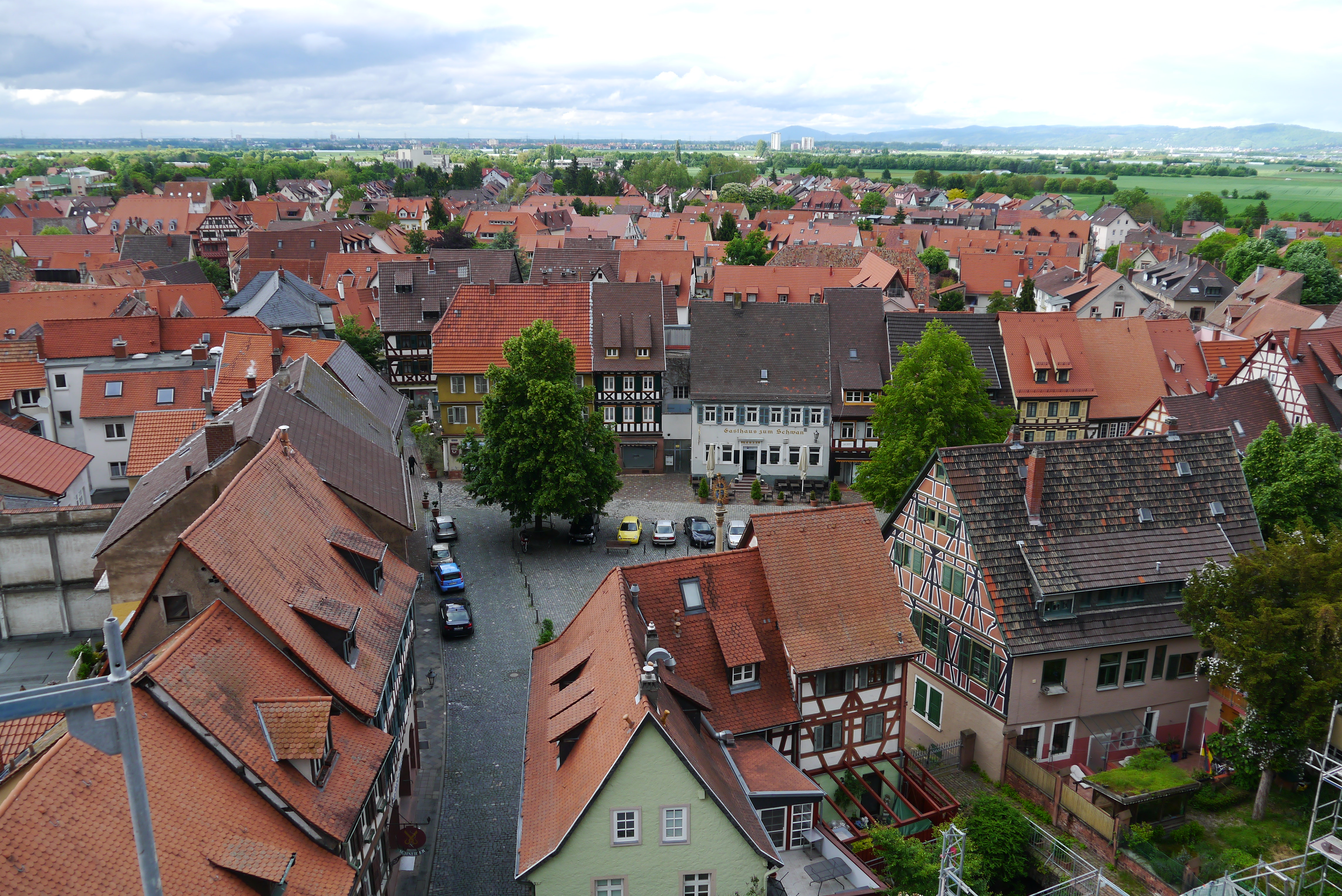 Marktplatz von Ladenburg, Deutschland (aus Sicht von St. Gallus)